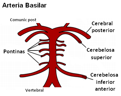 Arteria Basilar. Ramas de la arteria Basilar. Conecciones con la arteria Comunicante posterior del polígono de Willis(arriba) y con las arterias Vertebrales(abajo).